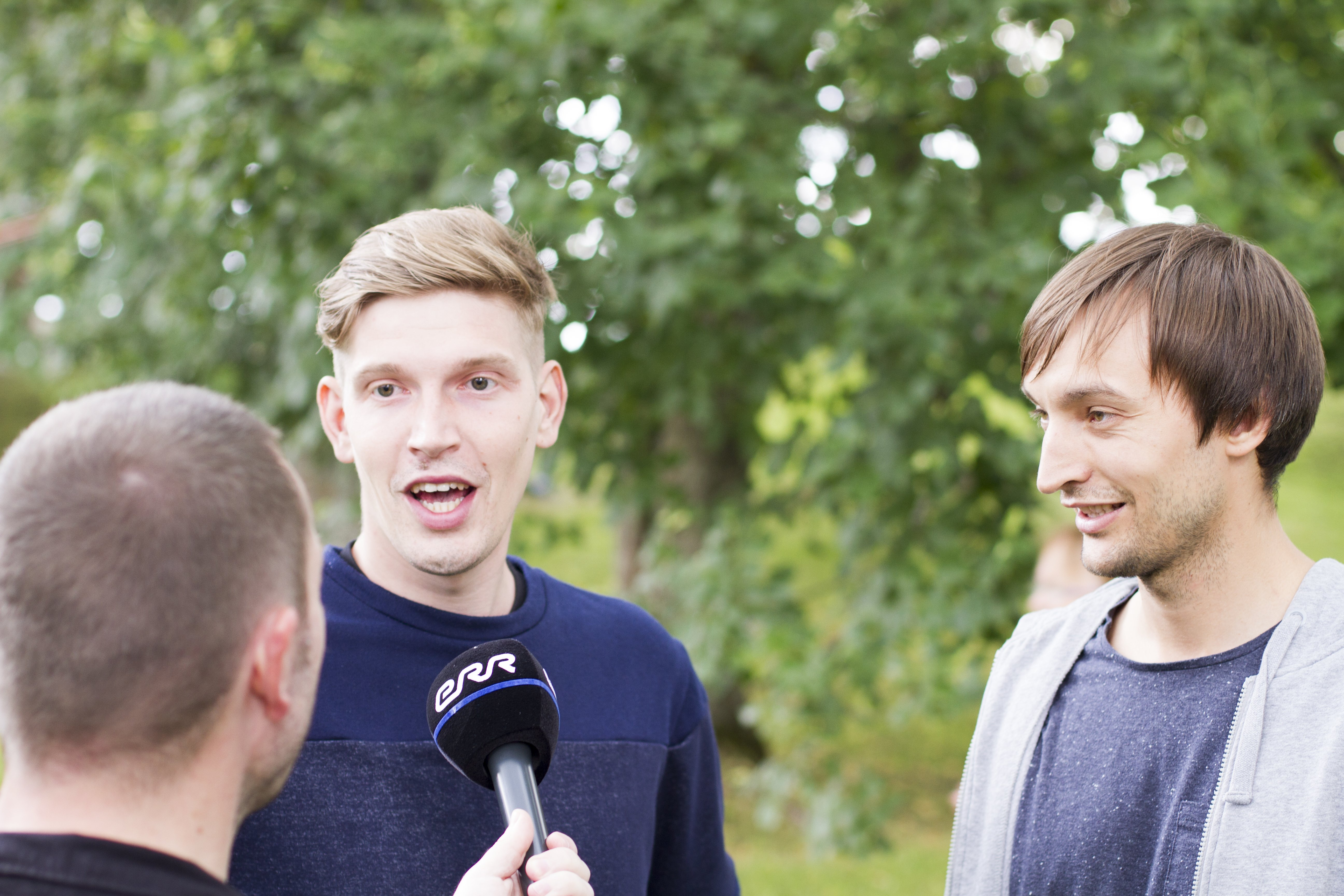 Henrik Kalmet ja Paavo Piik